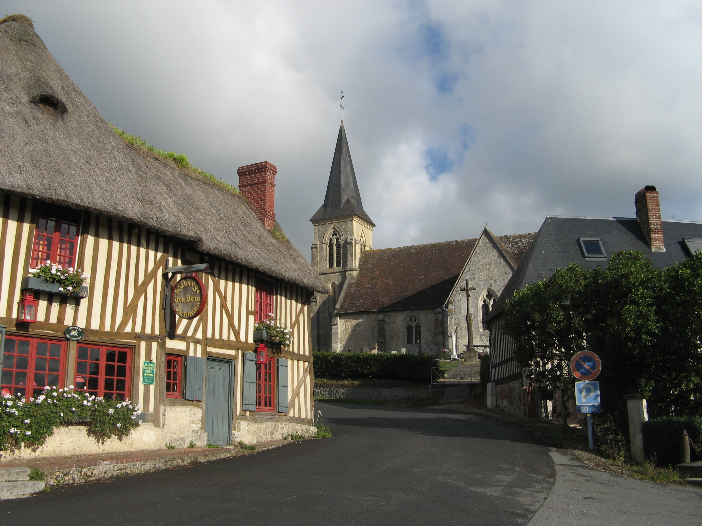 Rue principale de Pierrefitte-en-Auge, France.